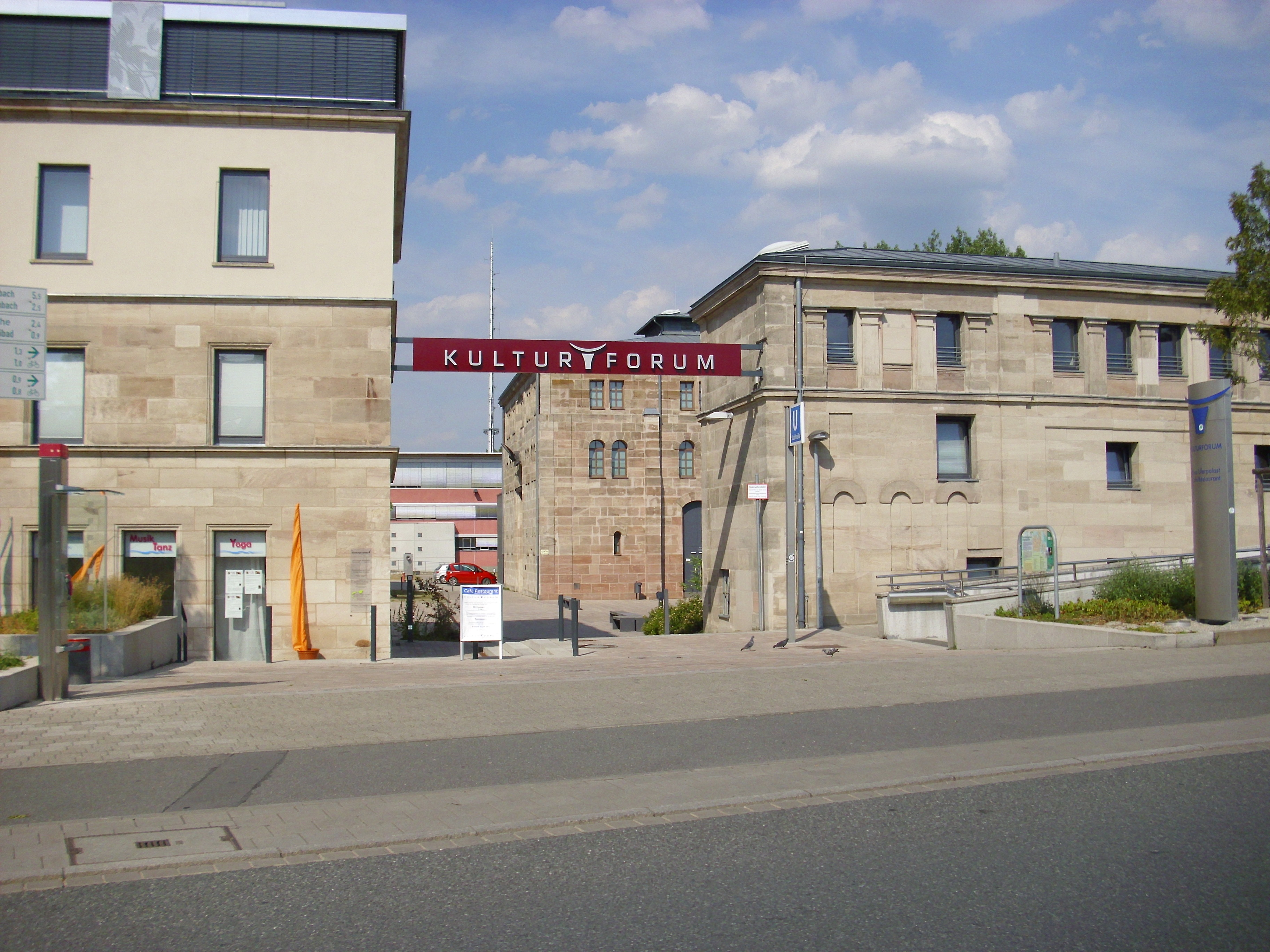 Ansicht des Kulturforums Fürth in der Würzburger Str. 4 vom Juli 2010